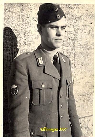 German paratrooper in uniform - Ellwangen 1957